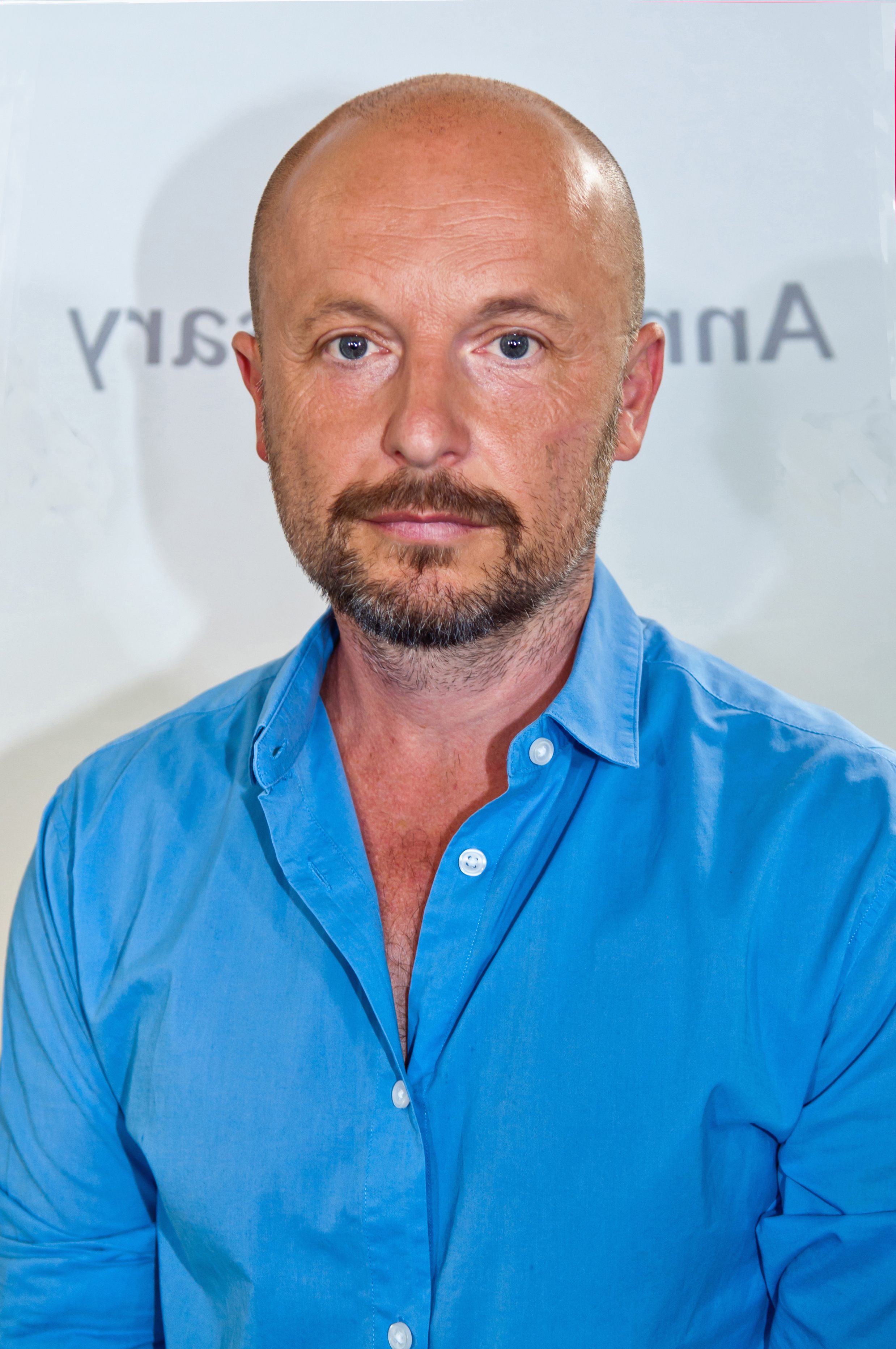 fotografie, autor Jiri Langpaul, copyright vlastní - Tomáš Mašín, vlastní archiv